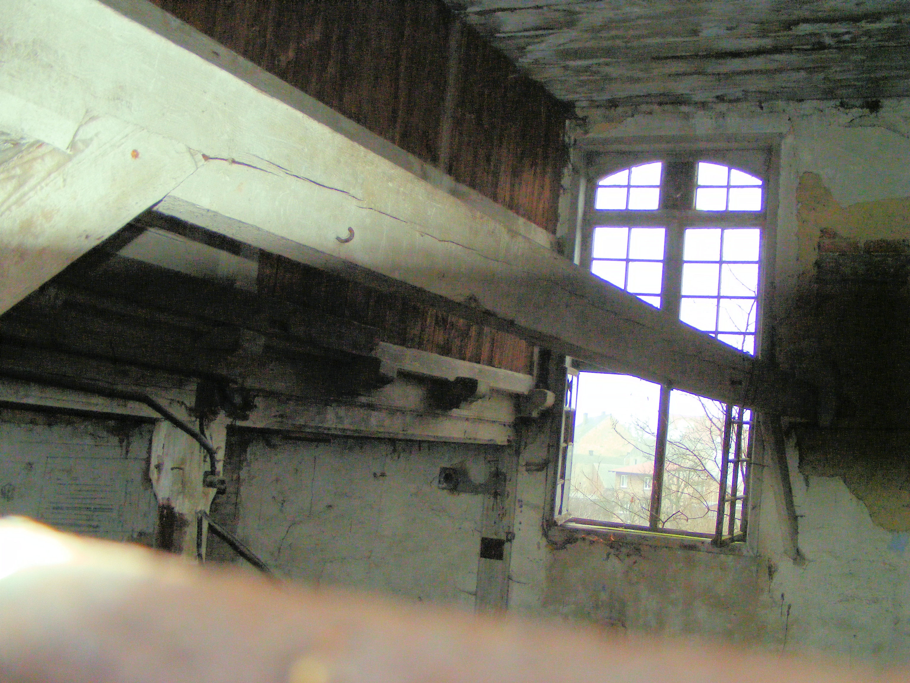 Wnętrze dawnej synagogi w Pszczewie.